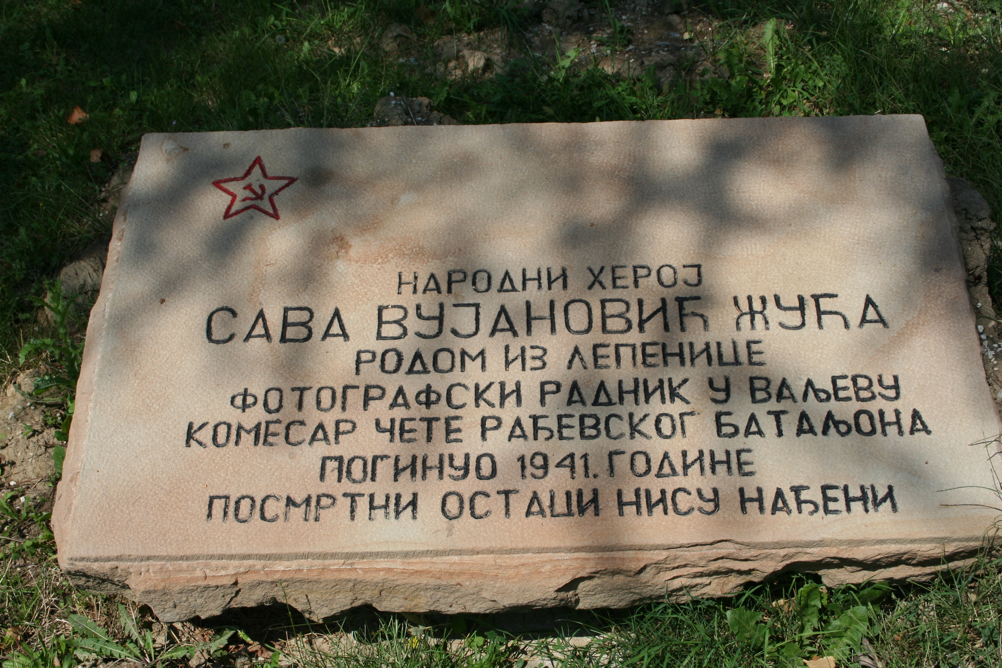 Spomen groblje na Krušiku, Valjevo